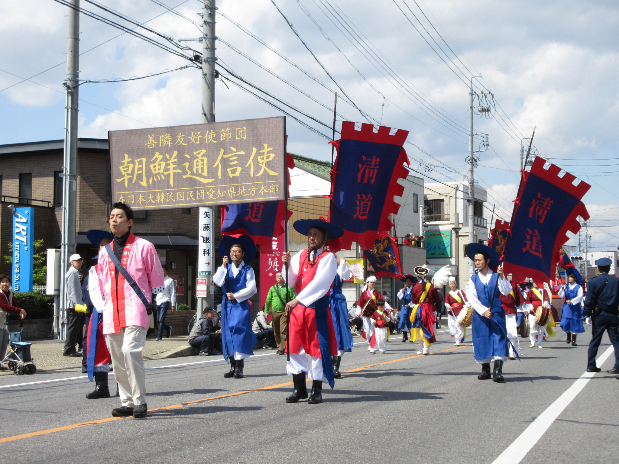 家康行列に参加する朝鮮通信使の隊列